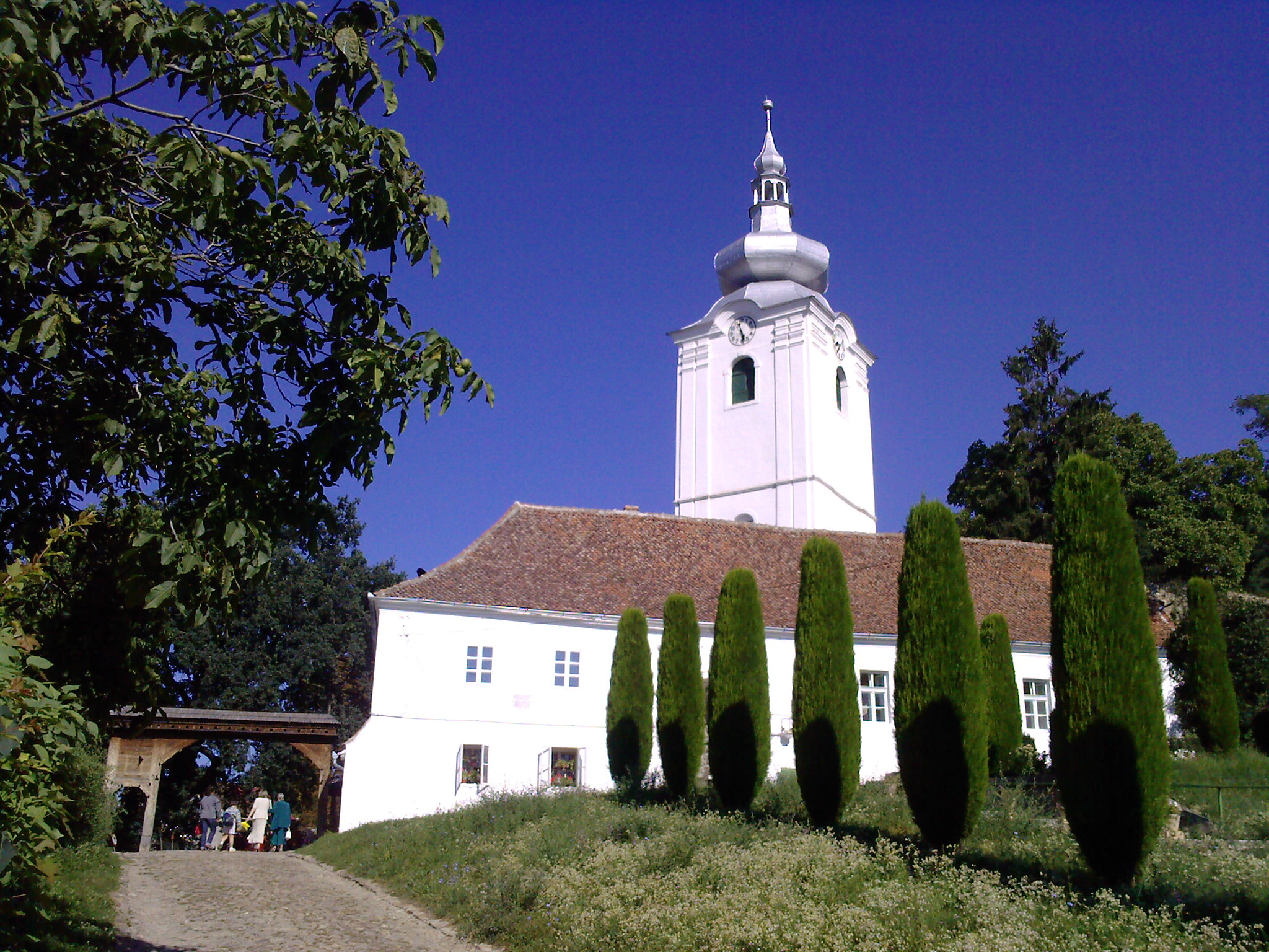 Biserica Reformată din Sfântu Gheorghe, construcţie din secolul al XIV-lea. 01